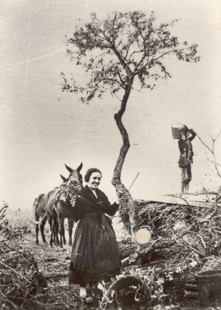 Vendimia - Cigales (Valladolid) - Cuaderno. Álbum de Valladolid - Fotografía 42 x 60 B/N